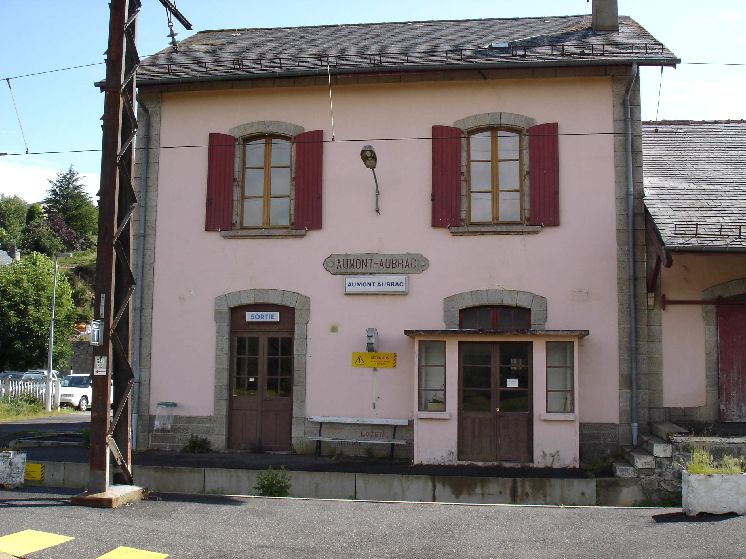 Gare d'Aumont-Aubrac